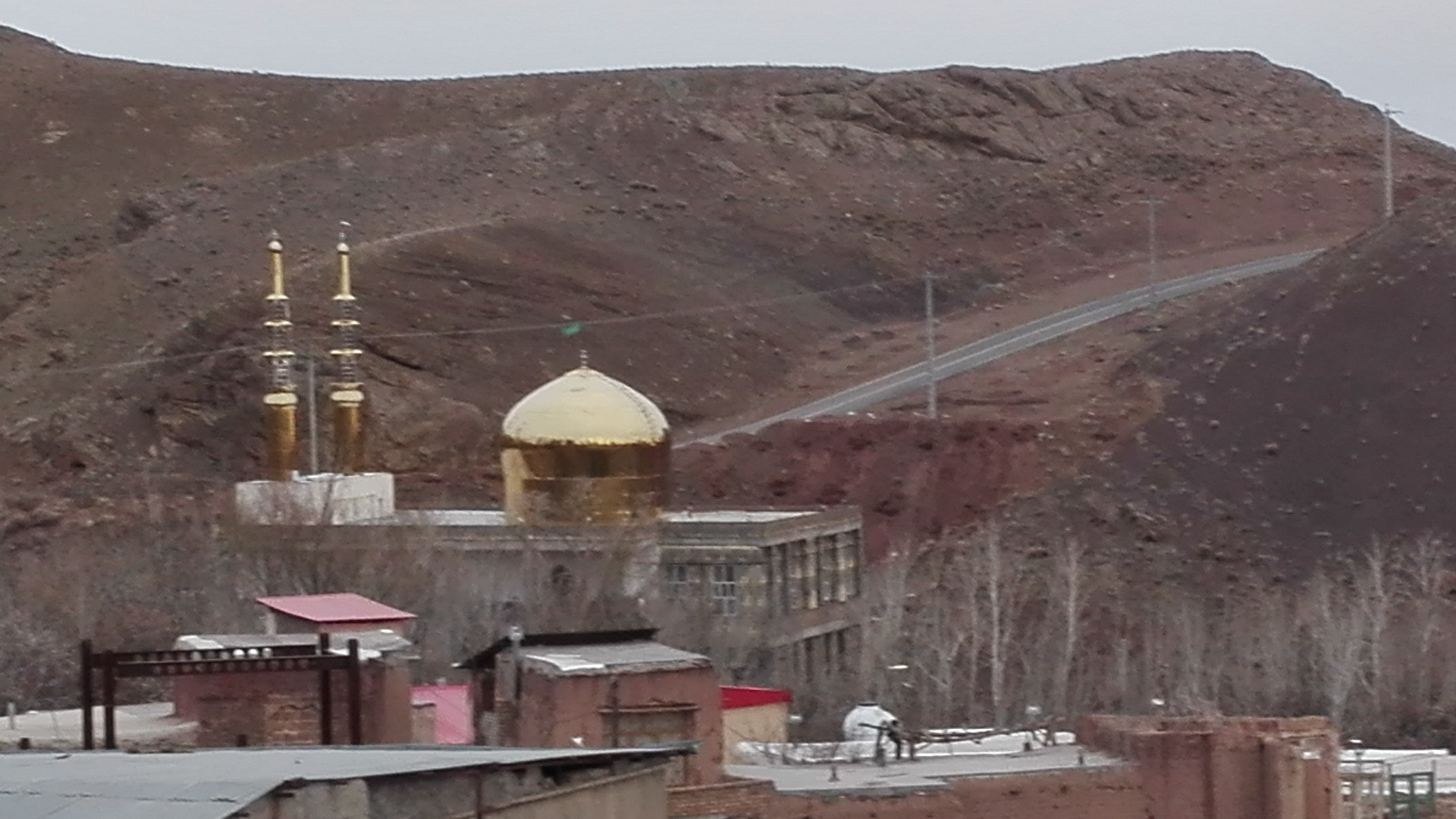 امام زادگان روستای سینقان